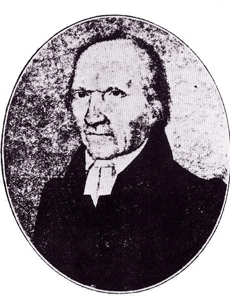 Pastor Bernhard Möllmann Menslager Lesegesellschaft Scan eines Fotos von einer um 1810 entstandenen Zeichnung eines unbekannten Künstlers